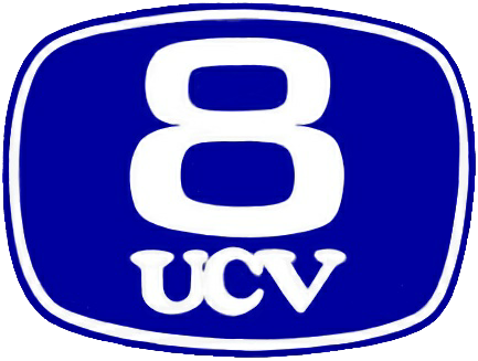 Simbolo de Canal 8 UCV hasta 1994